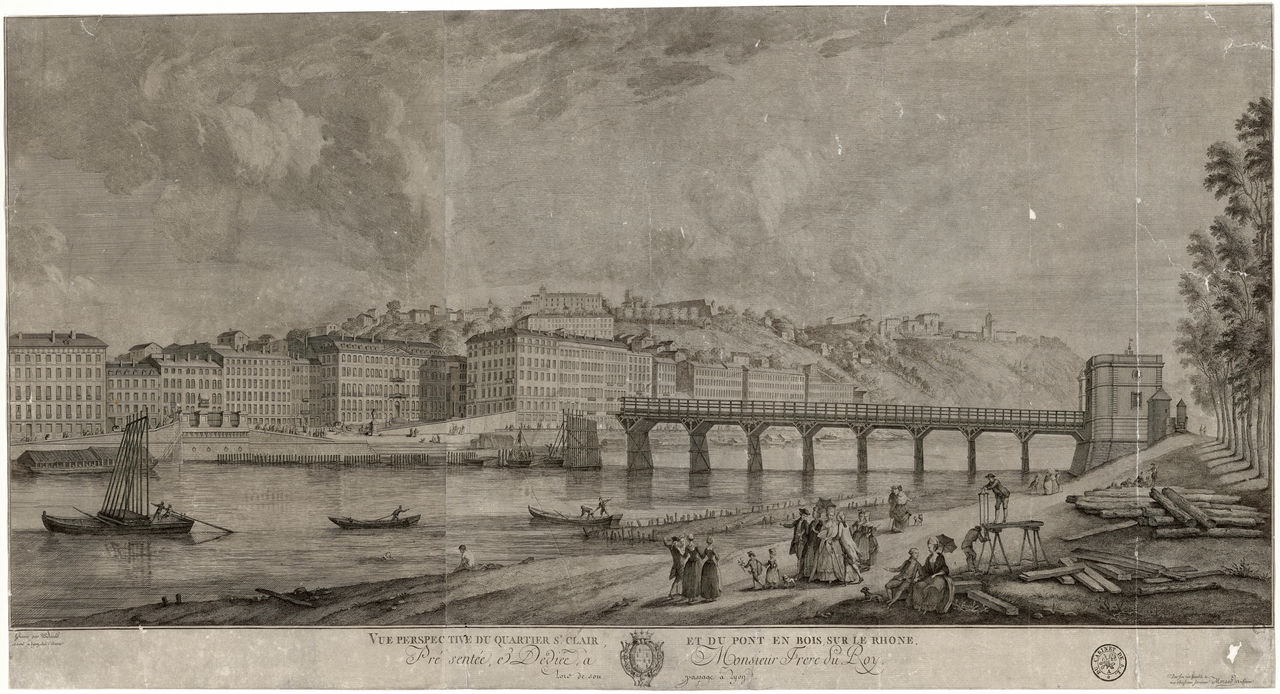 Vue perspective du quartier Saint-Clair de Lyon et du pont en bois sur le Rhône,estampe, eau-forte taille douce par Bidauld, Jean-Pierre-Xavier, 1745-1813 ; origine : Bibliothèque municipale de Lyon (F18BID010139)